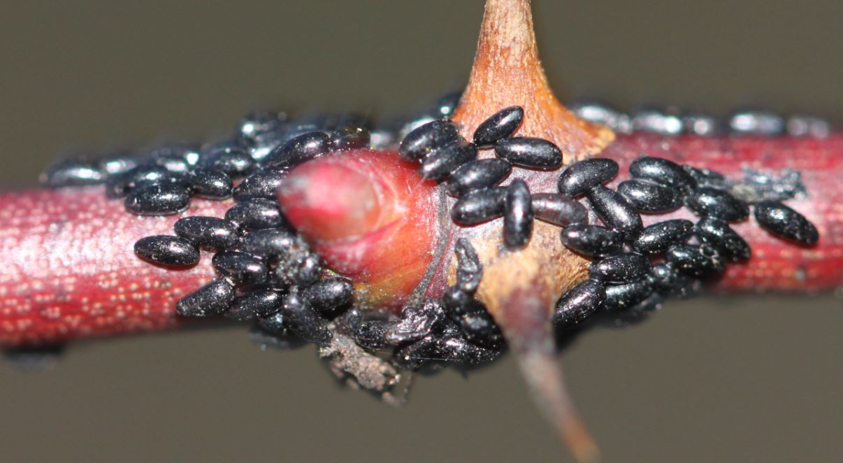 Eier der Großen Rosenblattlaus (Macrosiphum rosae), am 9.1.2018 an einer wild wachsenden Rose in der Schwetzinger Hardt